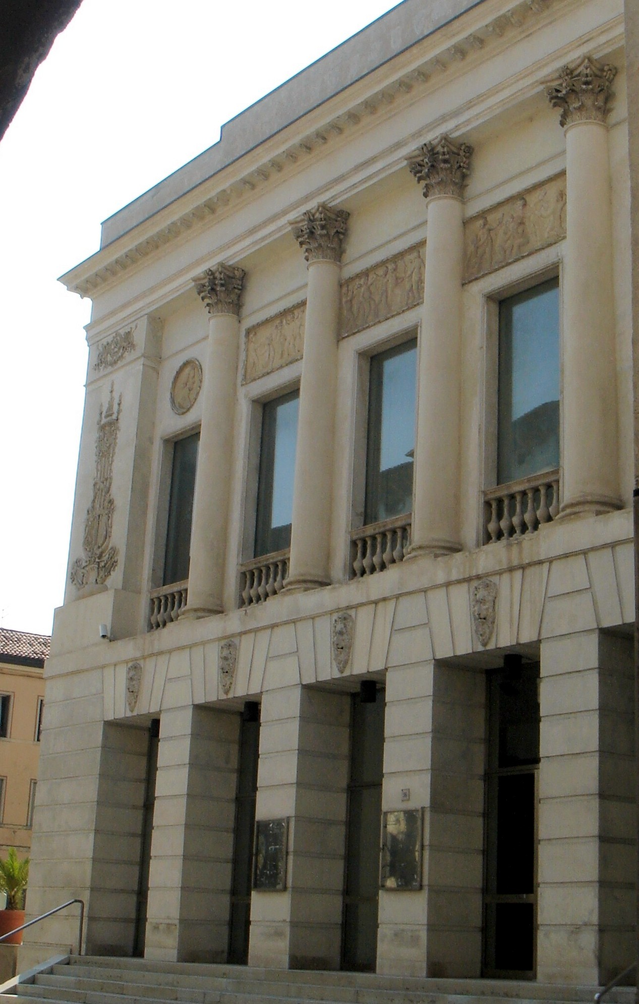 Serravalle di Vittorio Veneto (Treviso): facciata corta del Teatro Sociale.